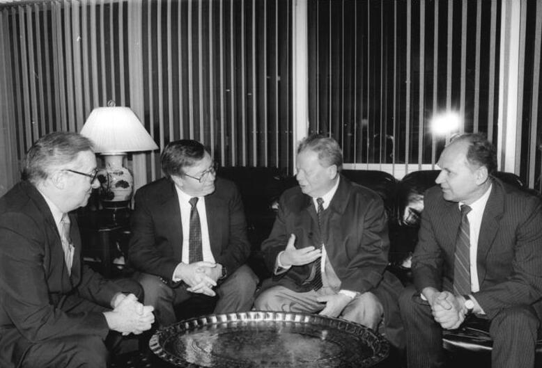 ADN-ZB/Koard 2.5.88 USA: Axen-Besuch Der Vorsitzende des außenpolitischen Ausschusses der Volkskammer der DDR, Hermann Axen (2.v.r.), Mitglied des Politbüros des ZK der SED, traf am 1.5. auf dem Washingtoner Regierungsflughafen Andrews Air Force Base zu einem Besuch in den Vereinigten Staaten ein. Er wurde vom stellvertretenden Unterstaatssekretär im USA-Außenministerium William Bodde (2.v.l.) begrüßt. An dem Gespräch nach der Ankunft nahmen der Botschafter der DDR in den USA, Dr. Gerhard Herder (r.), und der Botschafter der USA in der DDR, Francis J. Meehan (l.), teil.